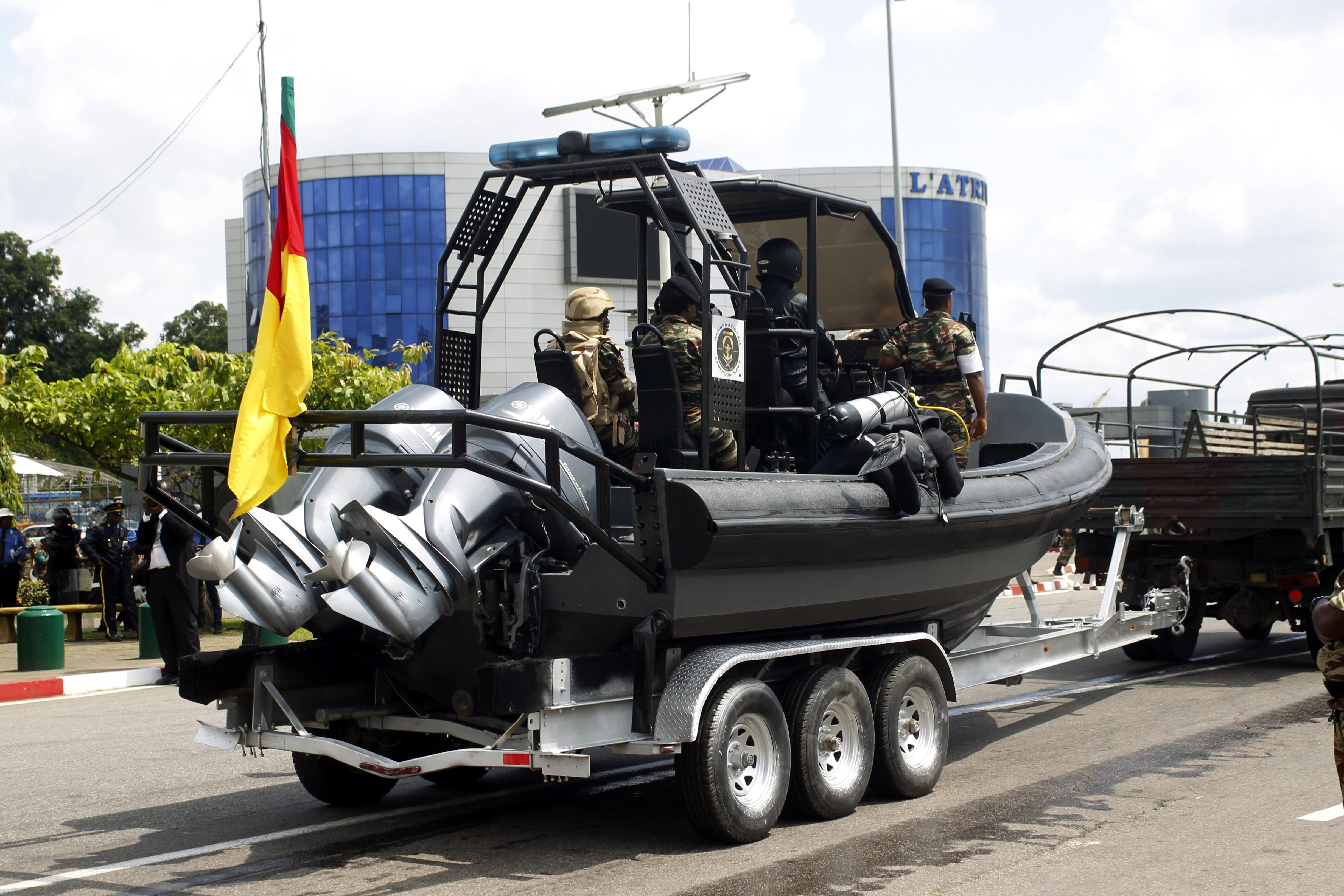 véhicules transportant le matériel militaire pendant le défilé de la fête national du Cameroun le 20 mai 2019. This is an image with the theme "Africa on the Move or Transport" from: Cameroon